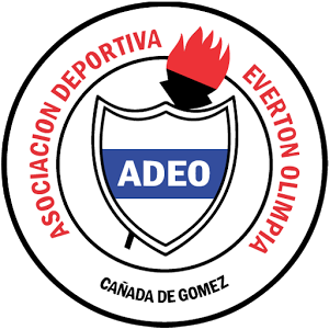 ESCUDO ASOCIACION DEPORTIVA EVERON OLIMPIA